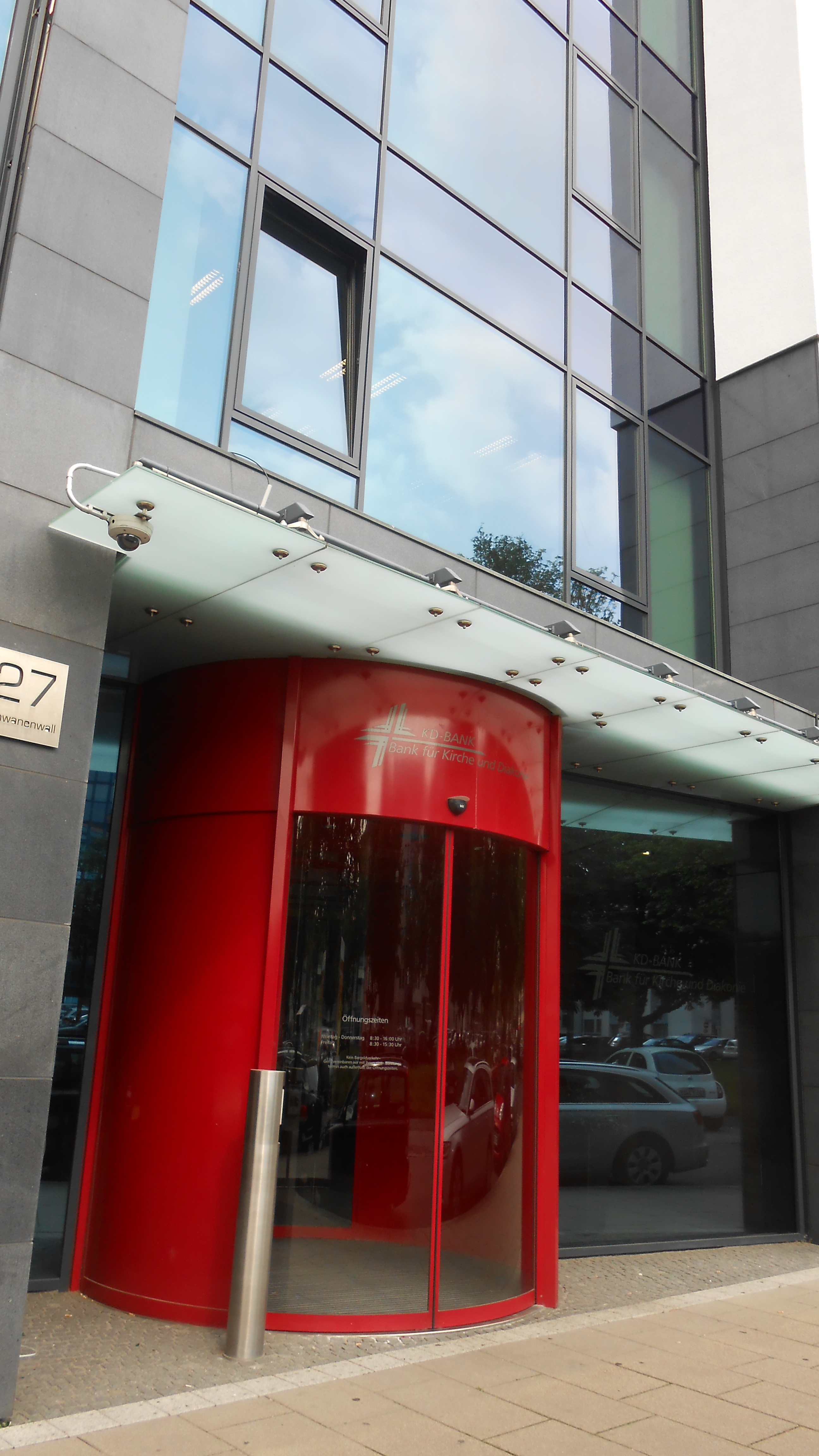 Der Hauptsitz der KD-Bank (Bank für Kirche und Diakonie) am Schwanenwall Nr. 27.